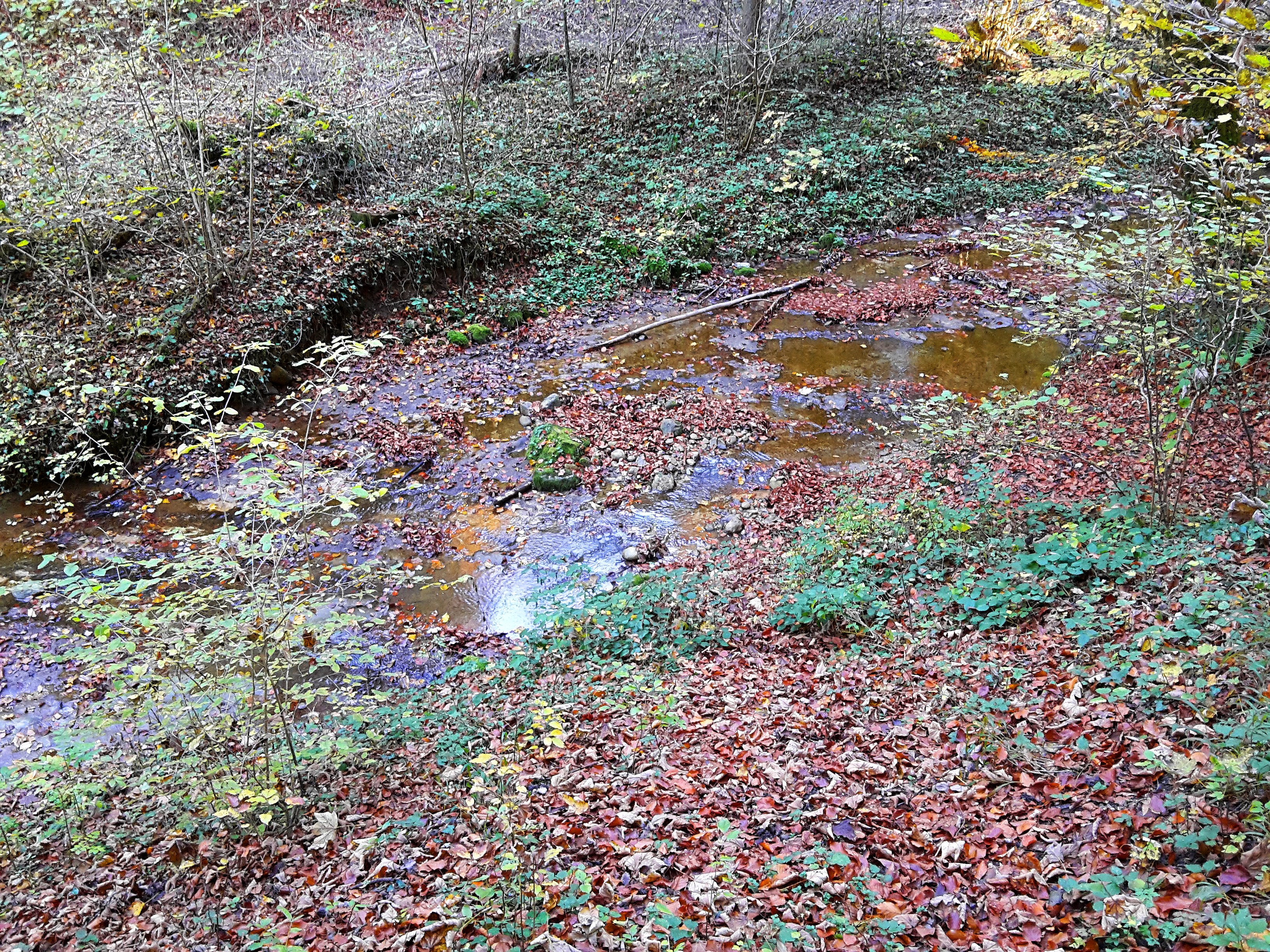 Arnerbach kurz nach Einmündung des Baches aus der Rischele am Anfang des Tobels